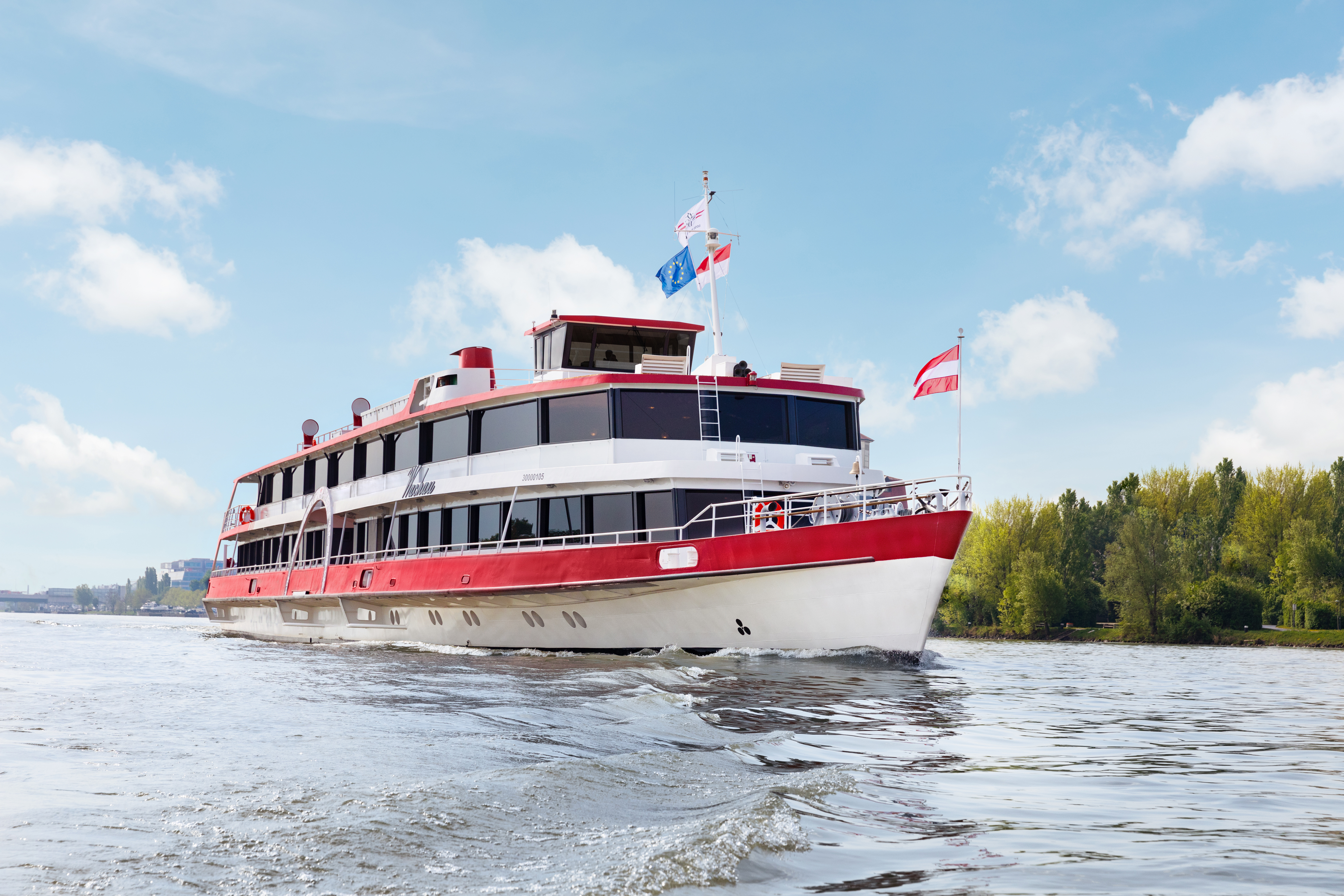 (c) DDSG Blue Danube - Andreas Jakwerth